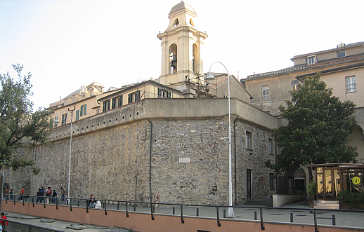 autore f.noceti